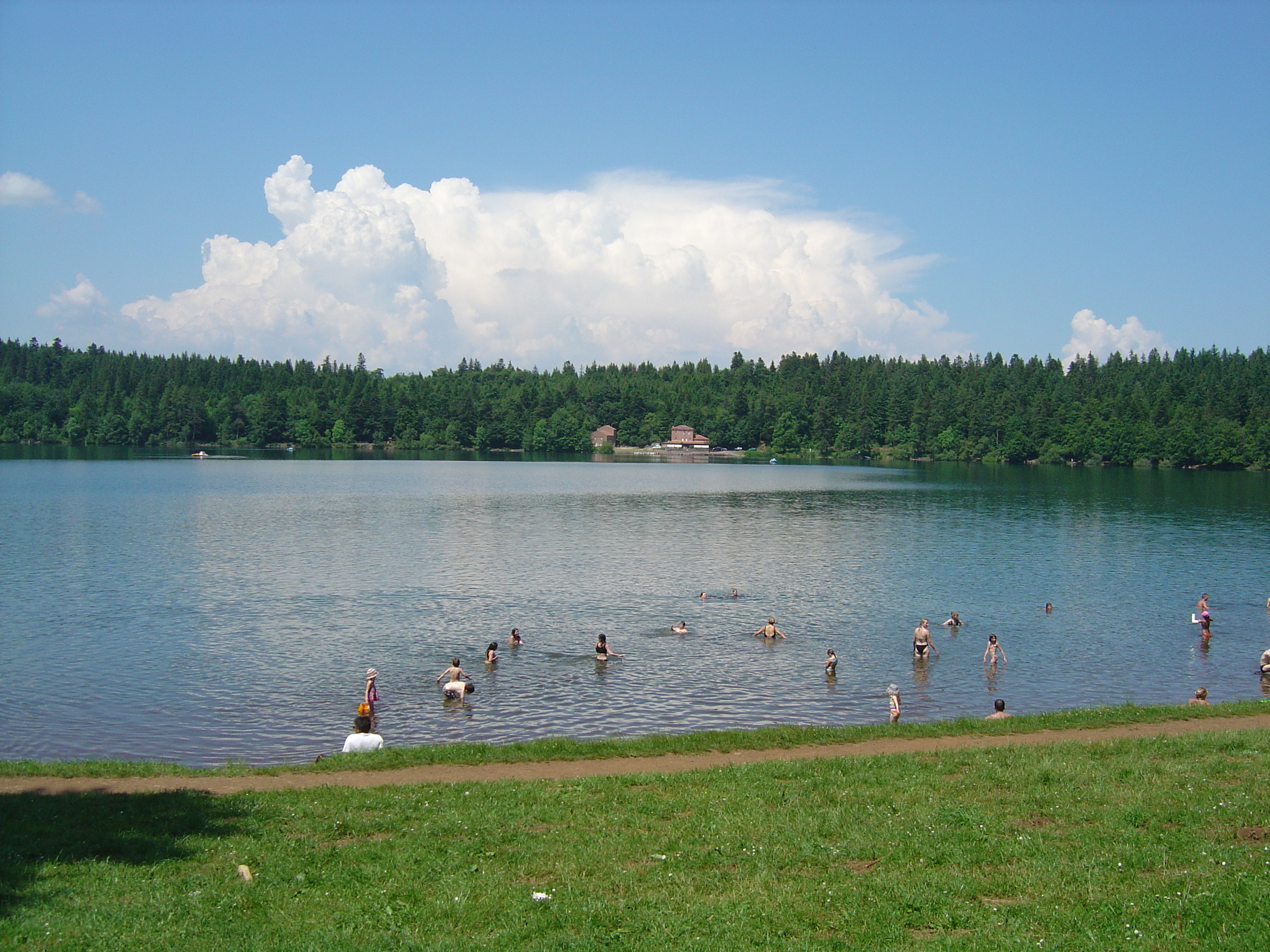 Plage du lac du Bouchet et restaurant au fond